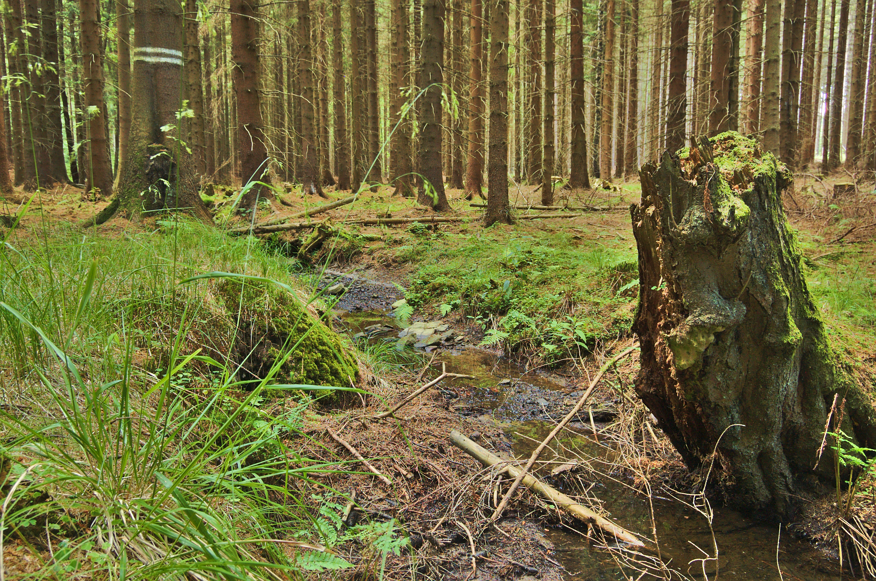 Přírodní památka Prameniště Hamerského potoka U velké jedle, Buková, okres Prostějov